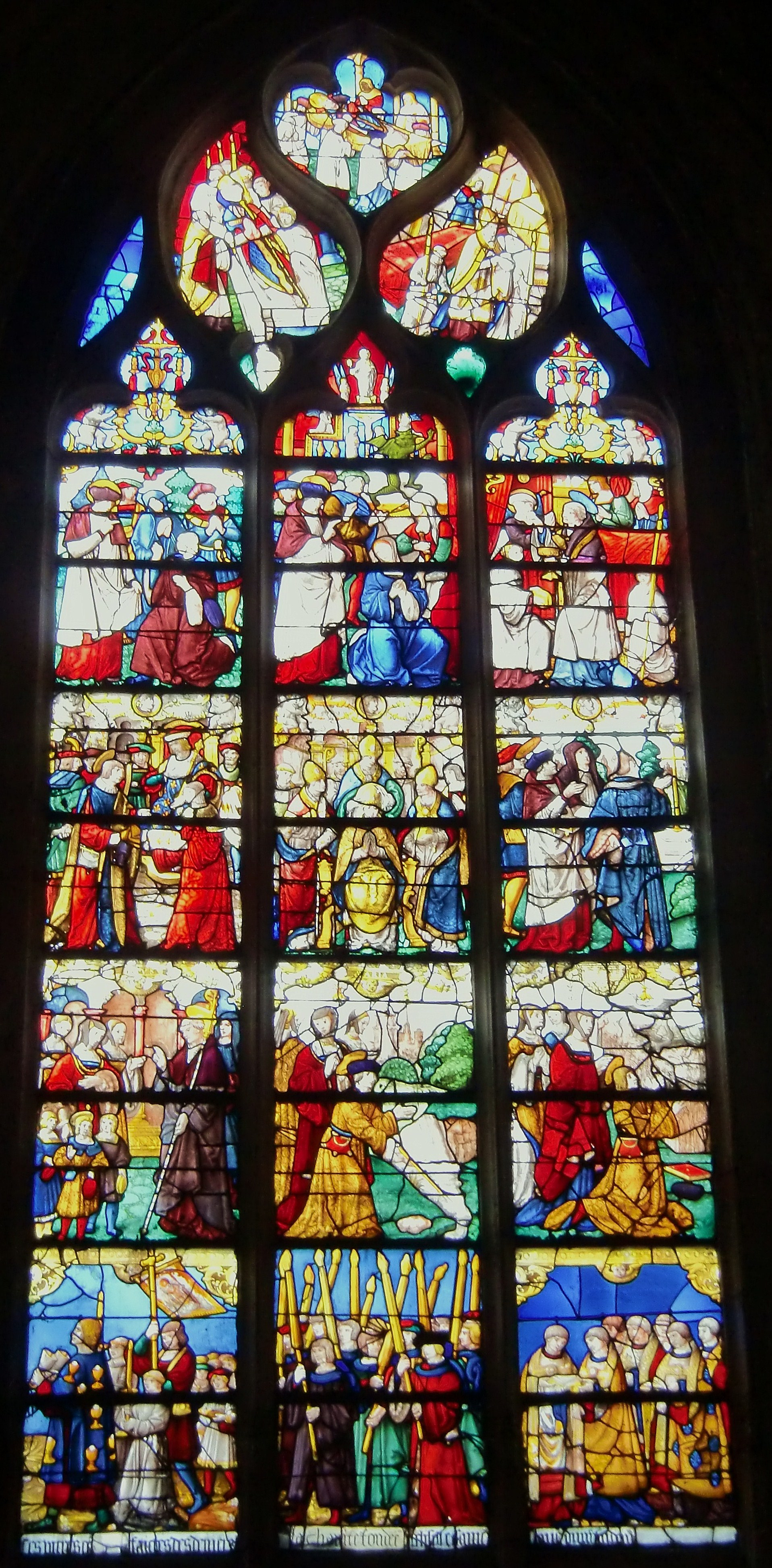 Eglise Saint-Ouen de Pont-Audemer (Normandie, France) - Vitrail (baie 18) Renaissance, vers 1515 (Les vitraux de Haute-Normandie, Éditions du CNRS, Paris 2001, p. 194, ISBN 2-271-05548-2)